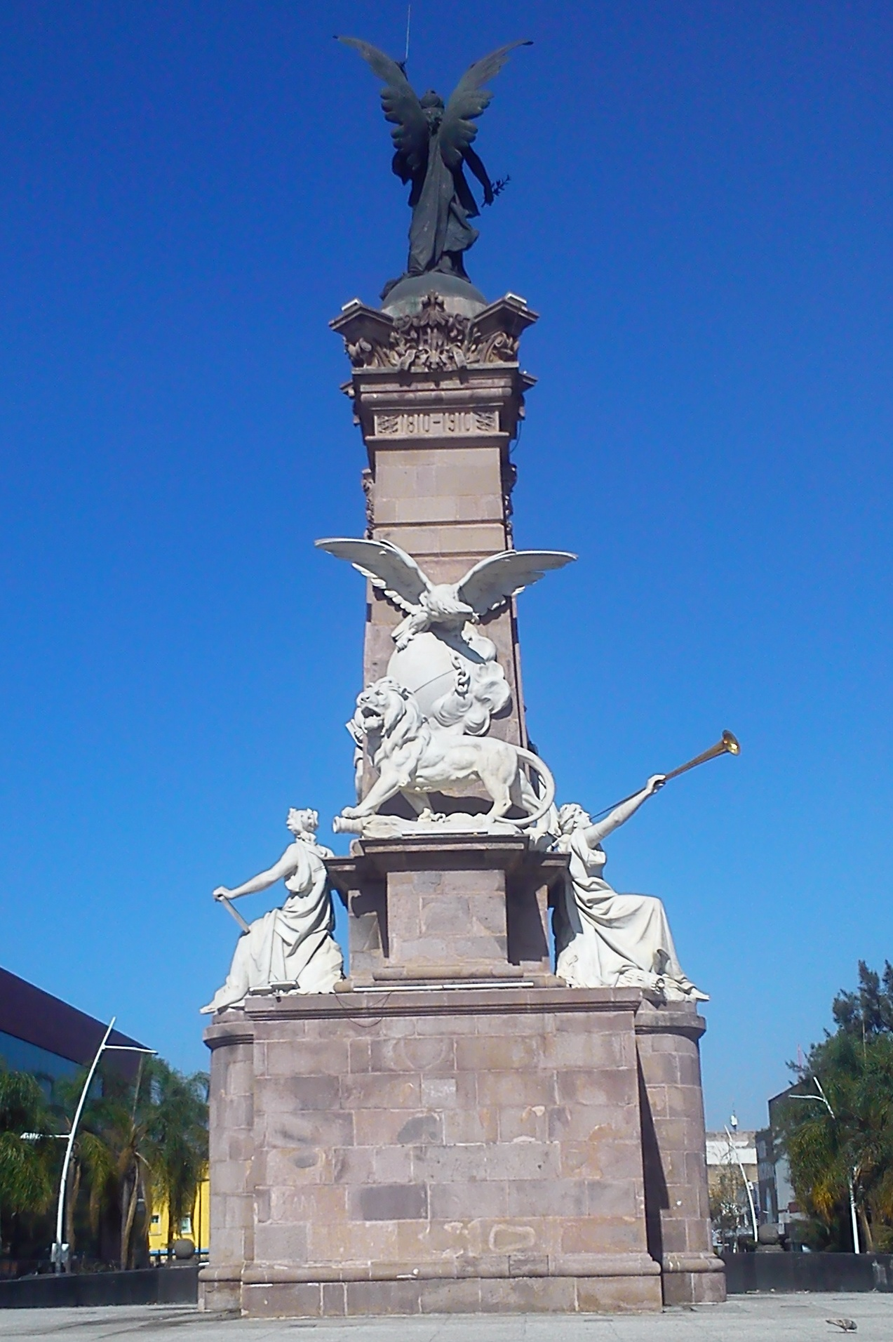 Guadalajara columna de la Independencia